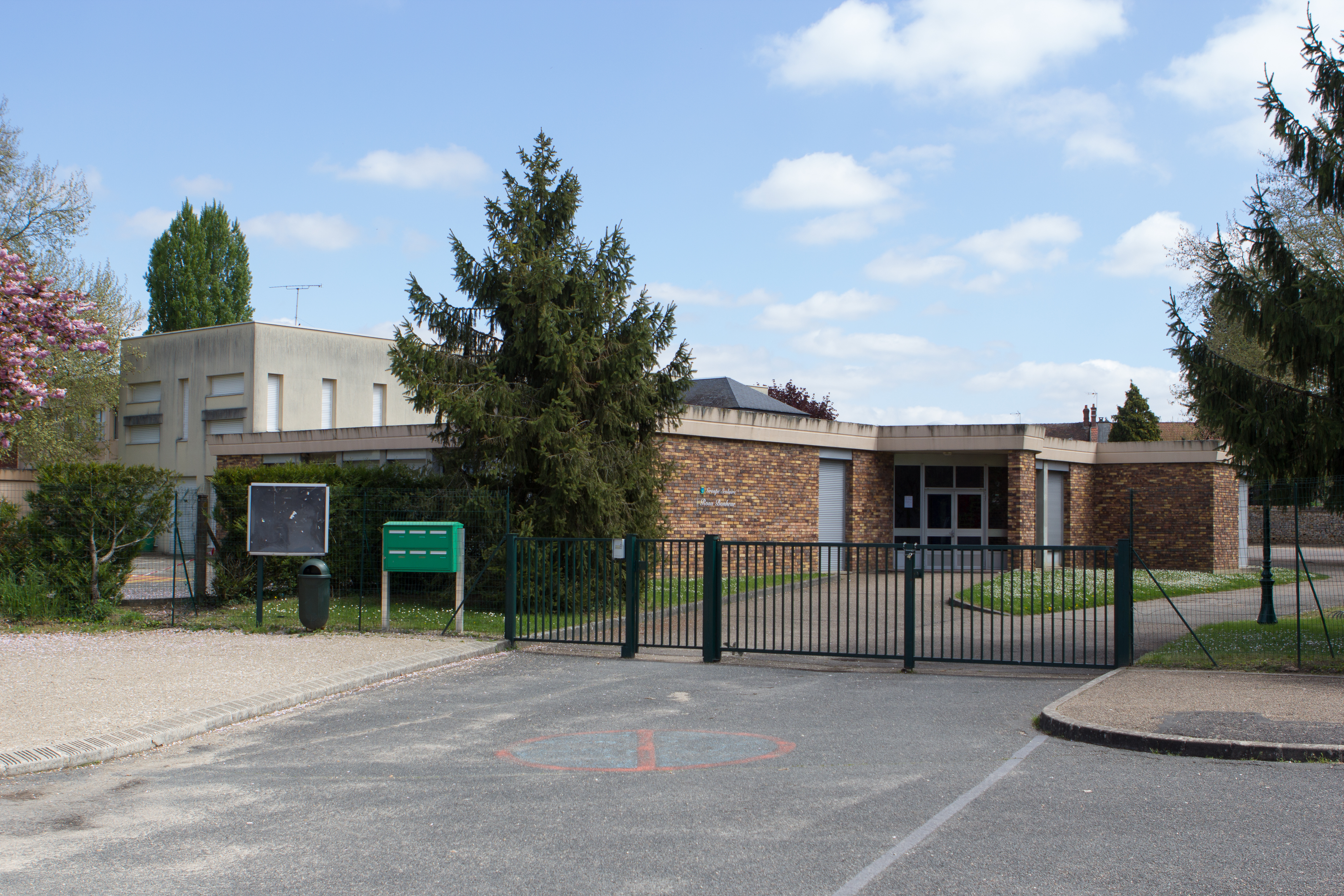 Ecole de de Chailly-en-Bière (Commune de Chailly-en-Bière, Seine-et-Marne, France)